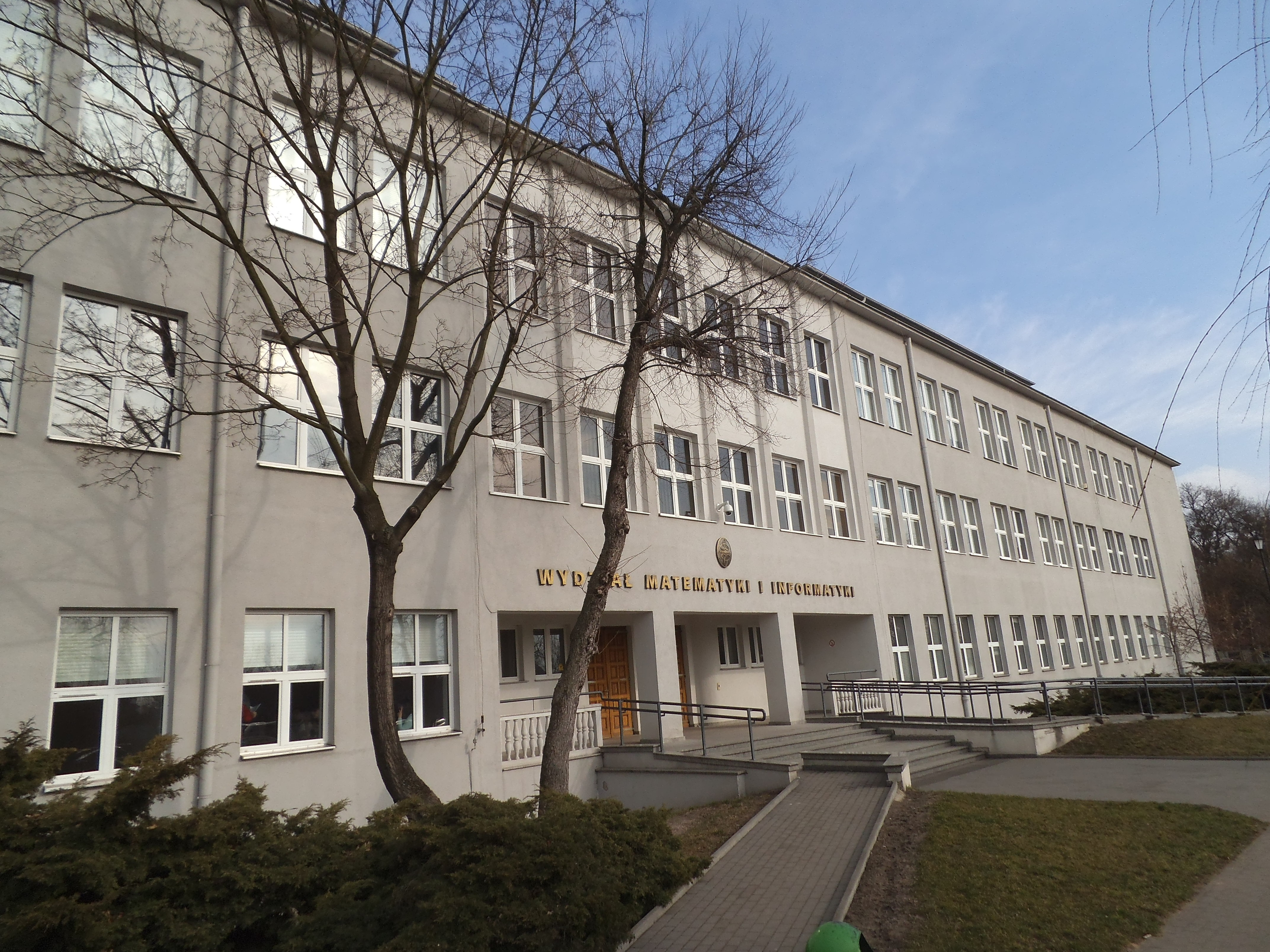 Wydział Matematyki i Informatyki UMK